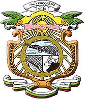 escudopuertoberrio